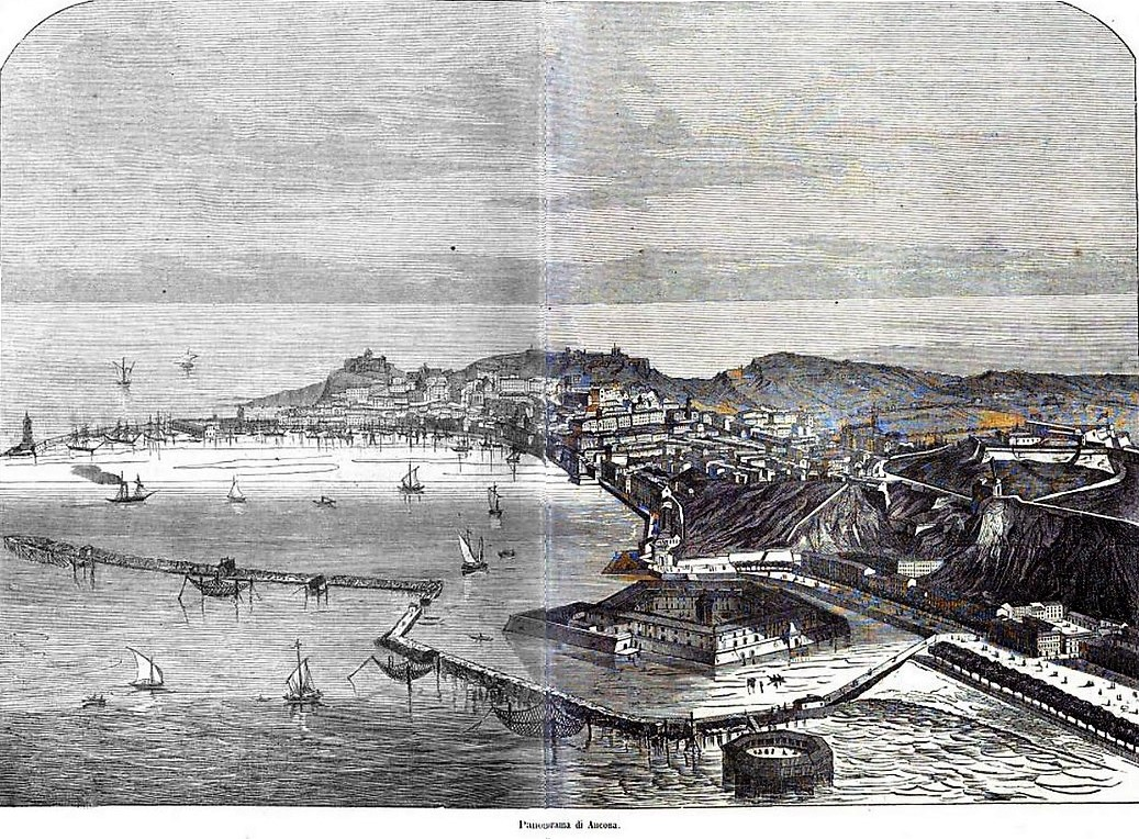 disegno di Ancona nel 1860